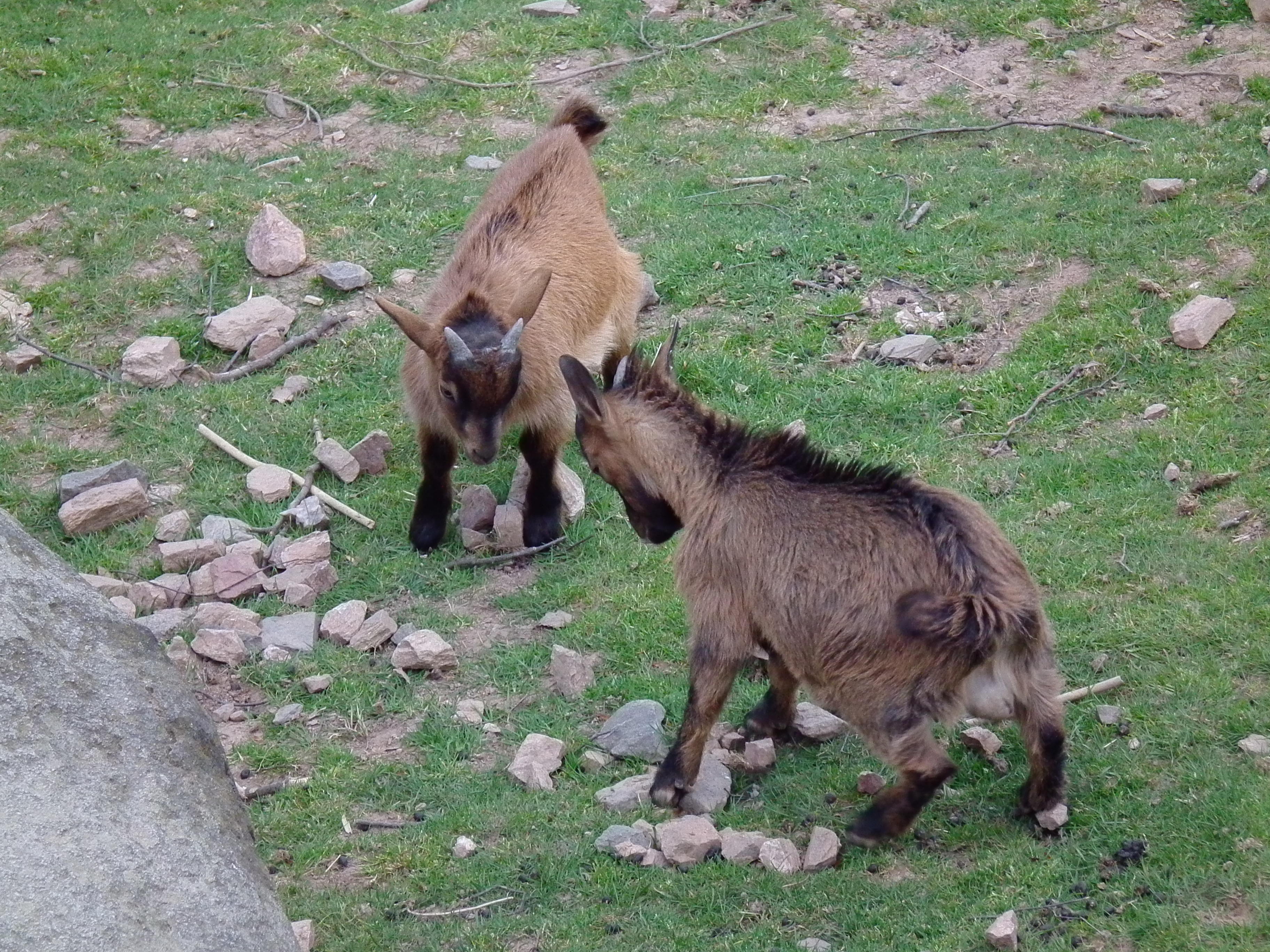 Klärung der Rangordnung unter jungen Zwergziegen im Bergtierpark Erlenbach (Hessen, Deutschland)